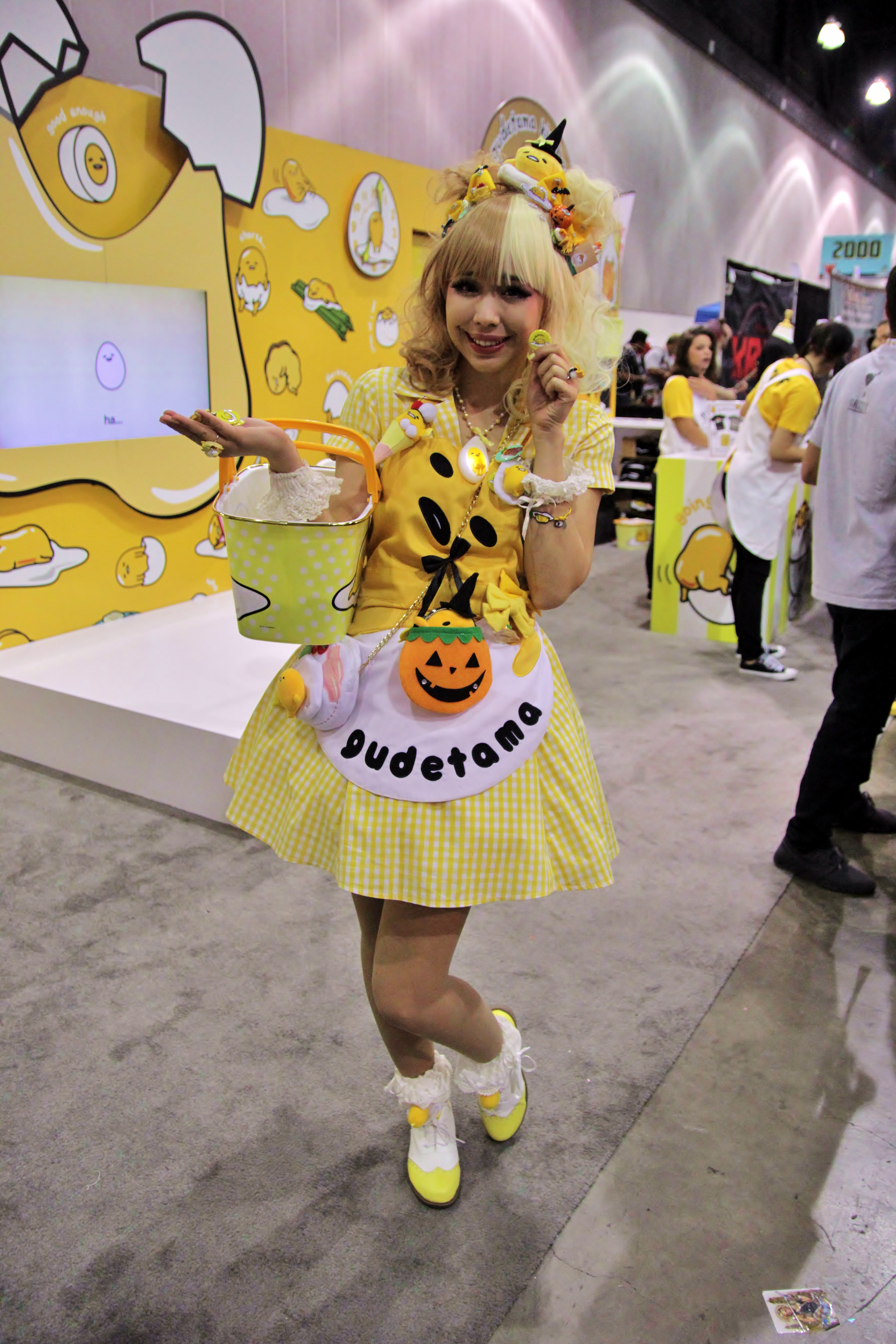 Cosplay at Comikaze Expo 2015.